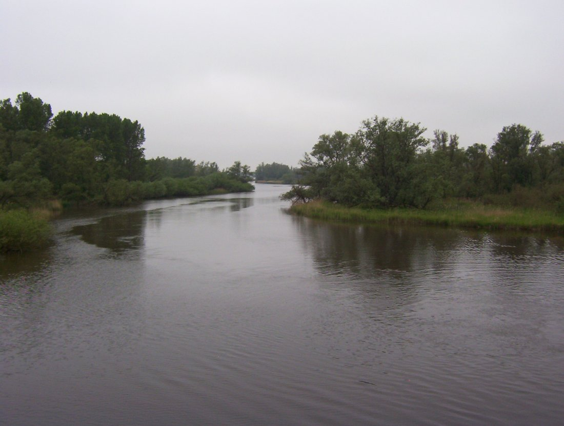 Zicht op een kreek in de Biesbosch, mei 2004. Eigen foto, gebruik vrij